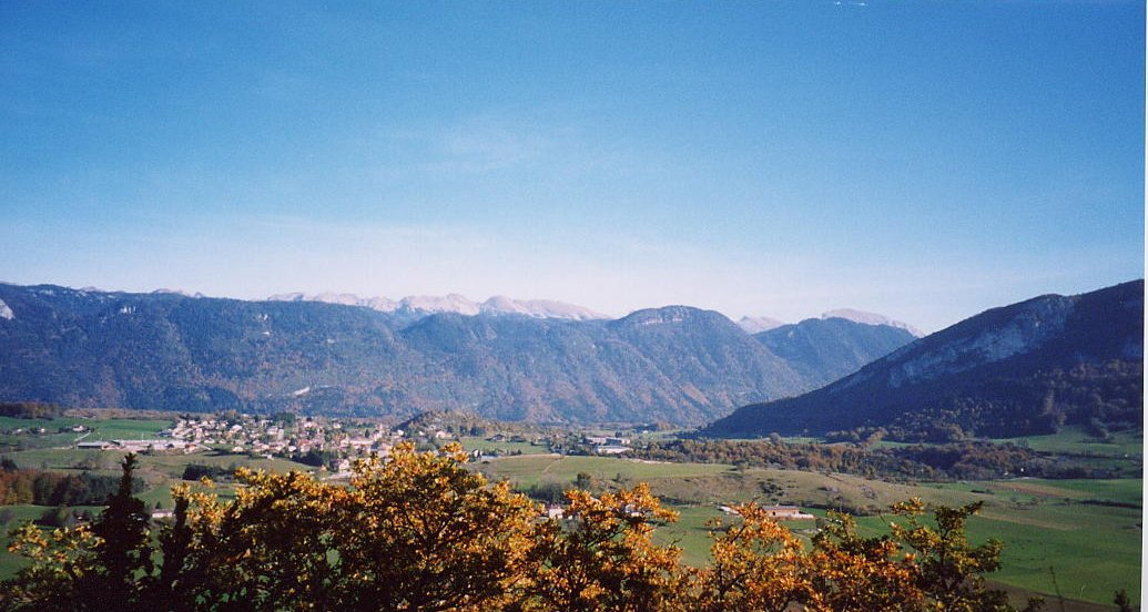 La Chapelle en Vercors, dans le Vercors Dromois. Les hauts plateaux sont visibles derriere le village. Auteur: Sybren Bakker